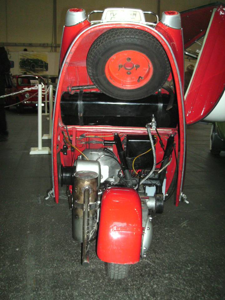 Messerschmitt Kabinenroller KR 200: Motorraum (aufgeklappt)